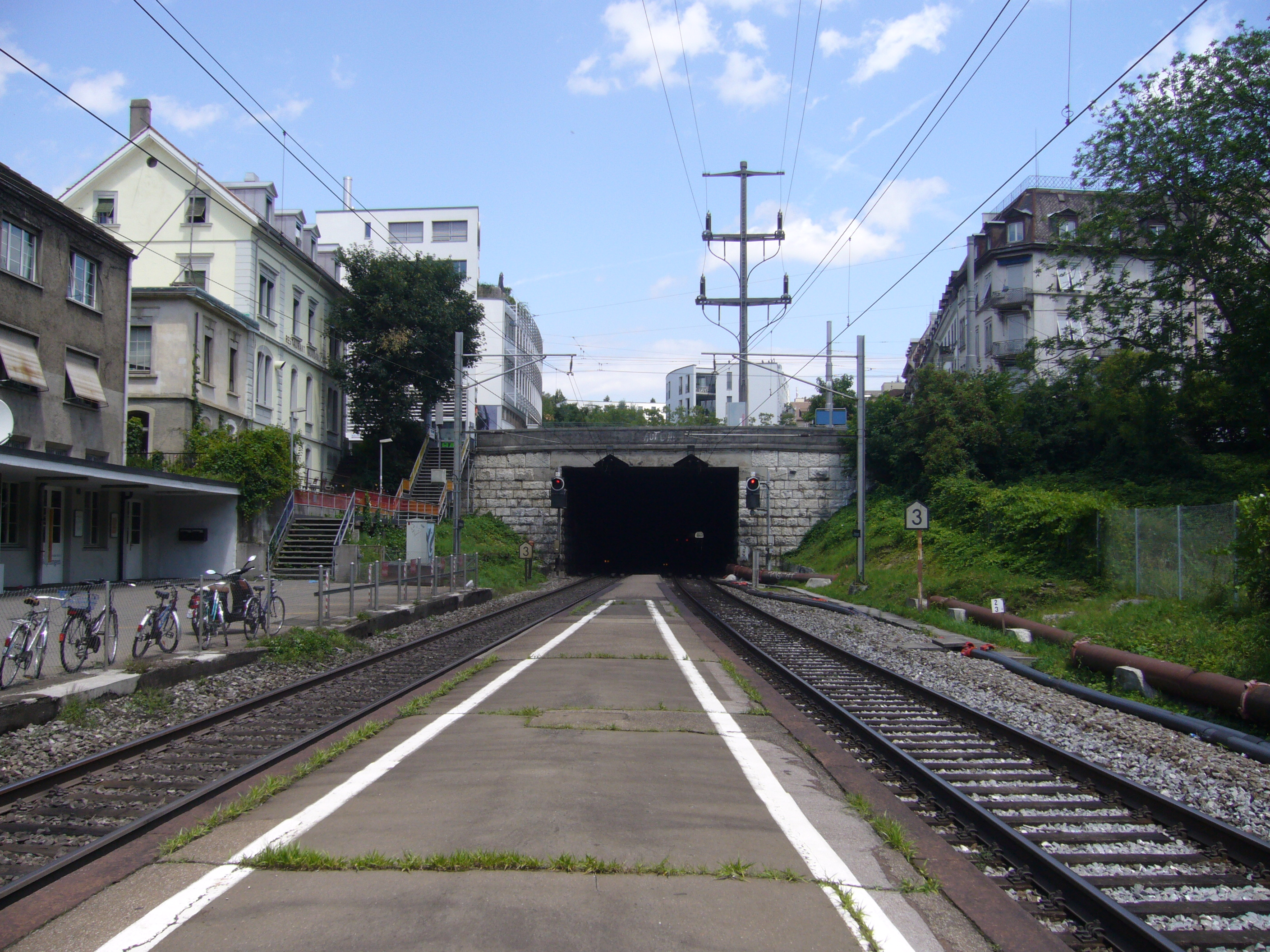 Blick von der Haltestelle Wipkingen auf die Nordbrücke am Eingang des Tunnel’s gen Örlikon.